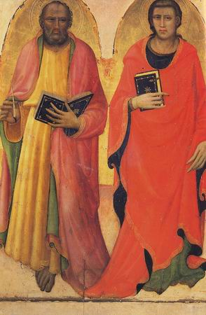 Pannelli con i Santi Matteo e Giovanni, Giacomo e Antonio abate